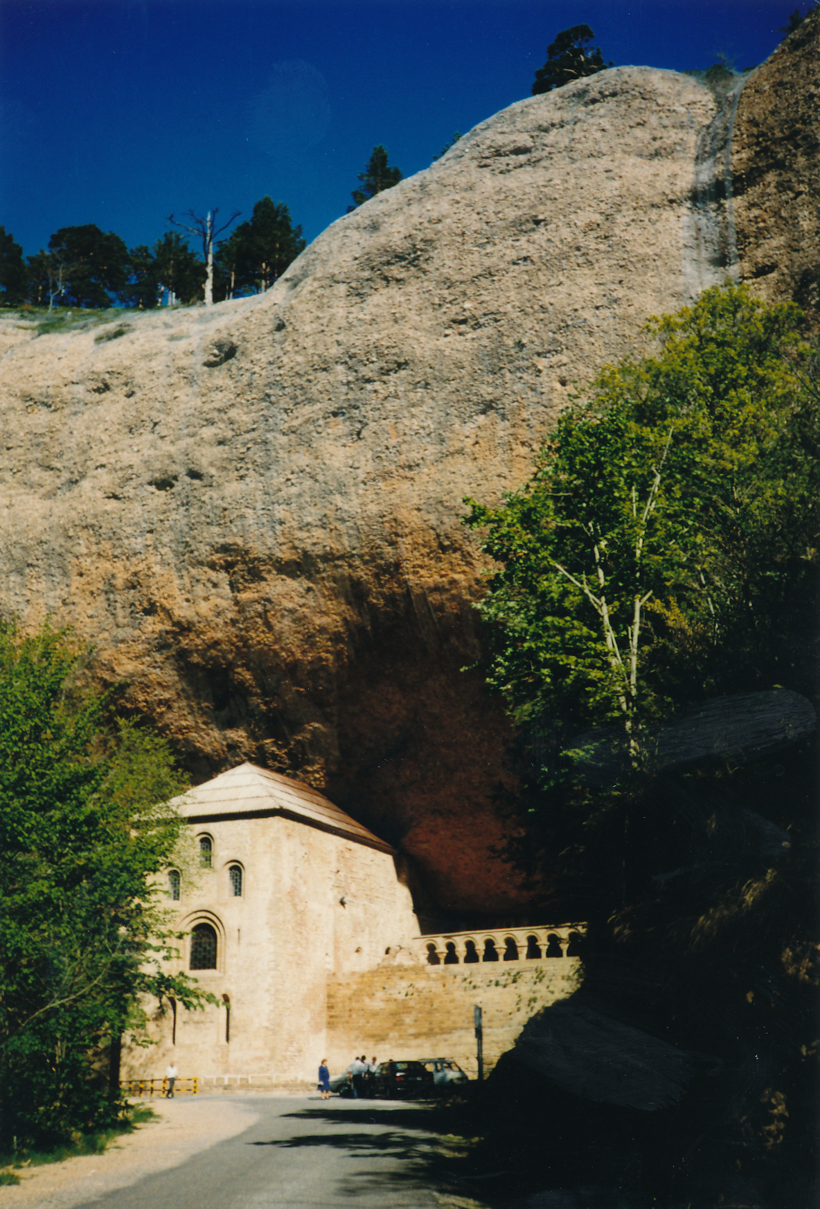 Felsenkloster San Juan de la Pena (am Jakobsweg) Datum: 06/1989 Urheber: Michael Pfeiffer Quelle: privates Fotoalbum des Urhebers